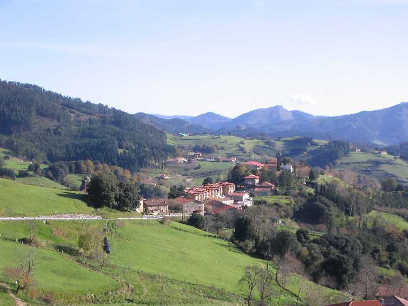 Vista general de Garai, Vizcaya, País Vaco, España.